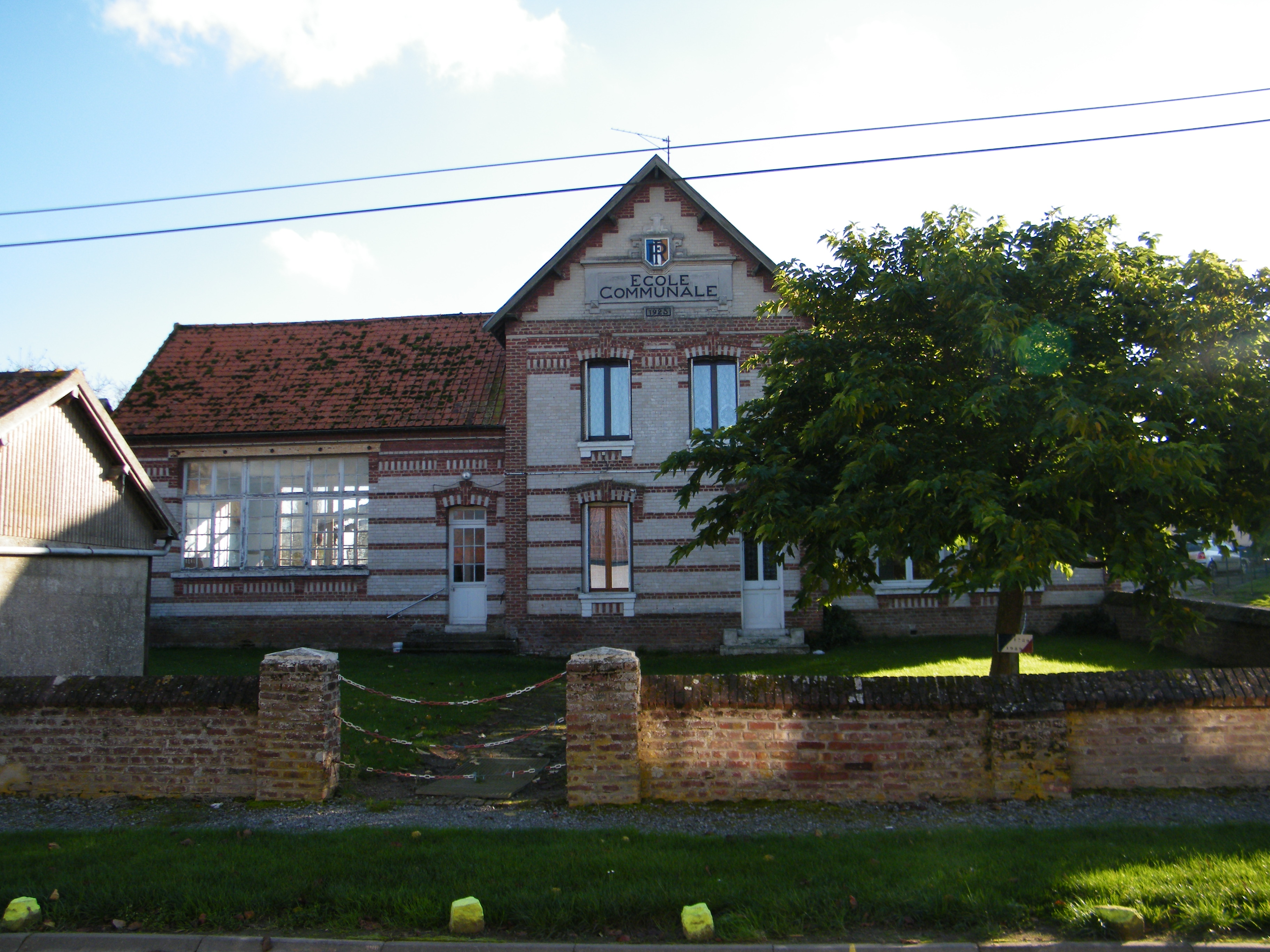 L'école dont la construction remonte à 1923.